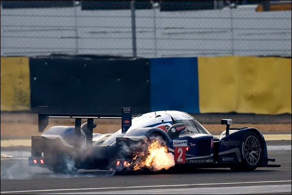 2010年的利曼，寶獅的Peugeot 908 HDi FAP 2號車，引擎系統發生故障。(注意排氣口異常的噴焰)